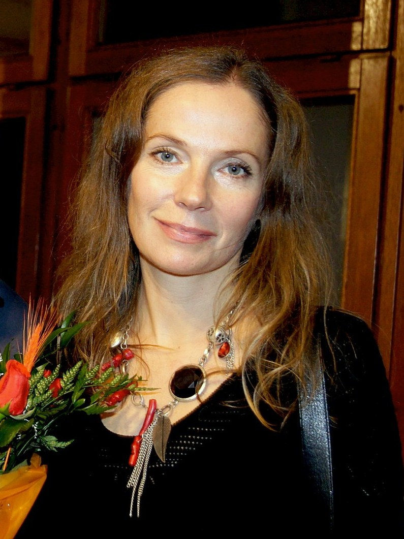 Joanna Bator, pisarka.